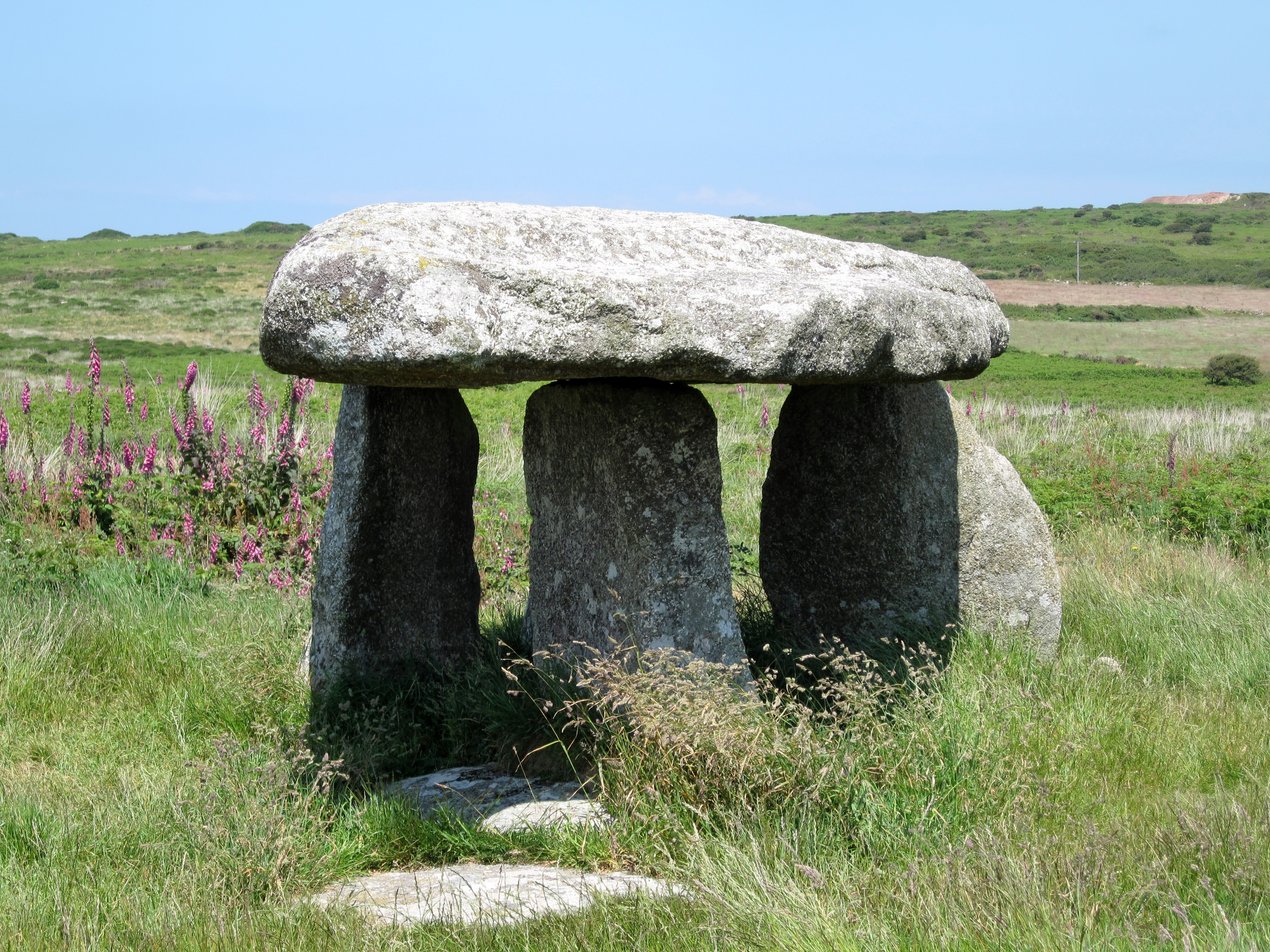 Lanyon Quoit, ein etwa 5500 Jahre alter Dolmen aus der Jungsteinzeit in Cornwall, England